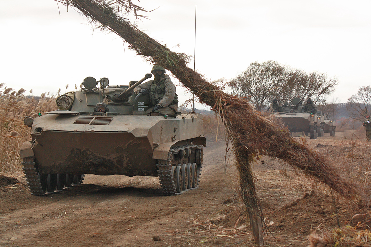 Завершающая фаза тактического учения с соединением ВДВ в Уссурийске.